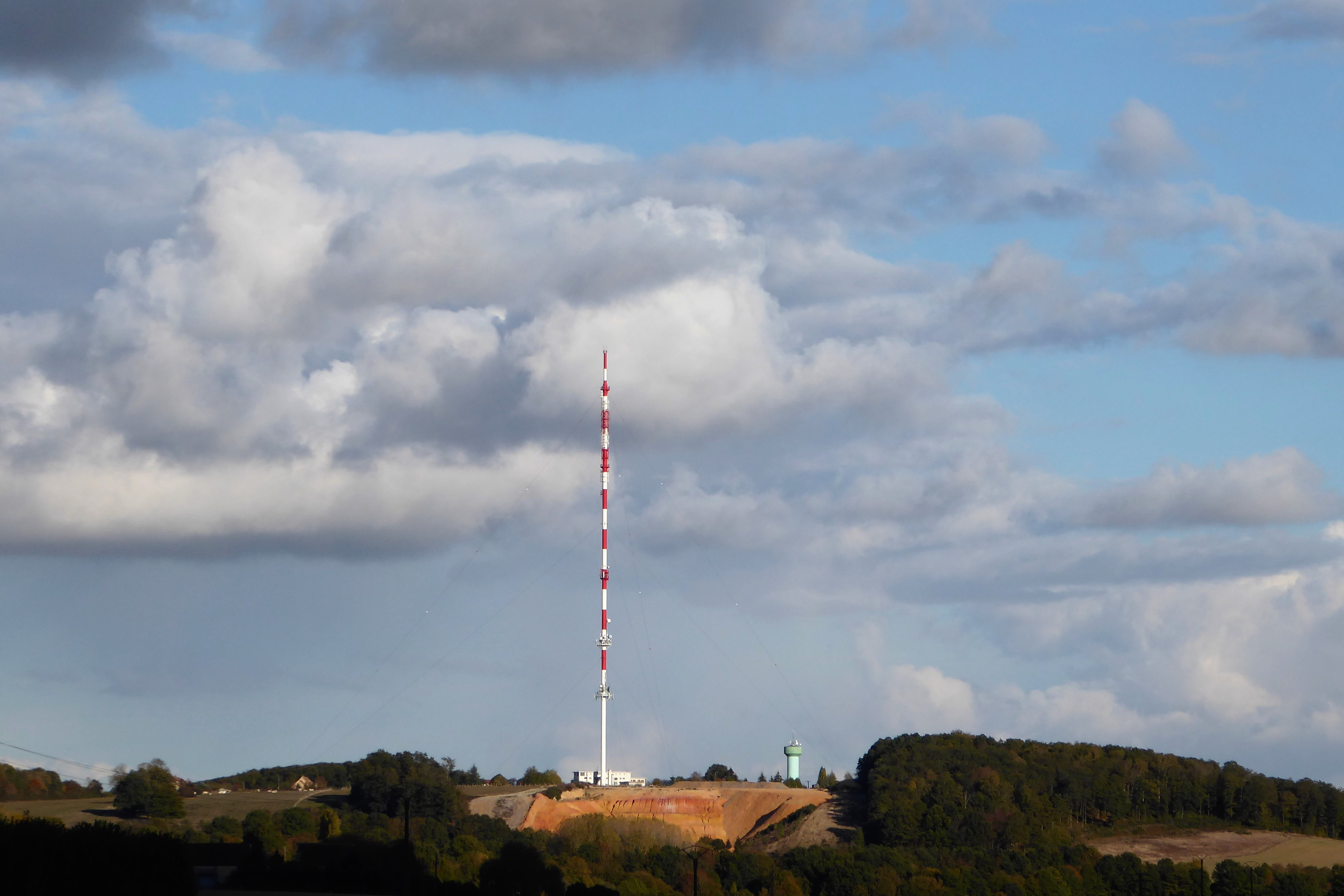 pylône de l'émetteur (hauteur : 200 mètres) et château d'eau de Montlandon, Eure-et-Loir, France.